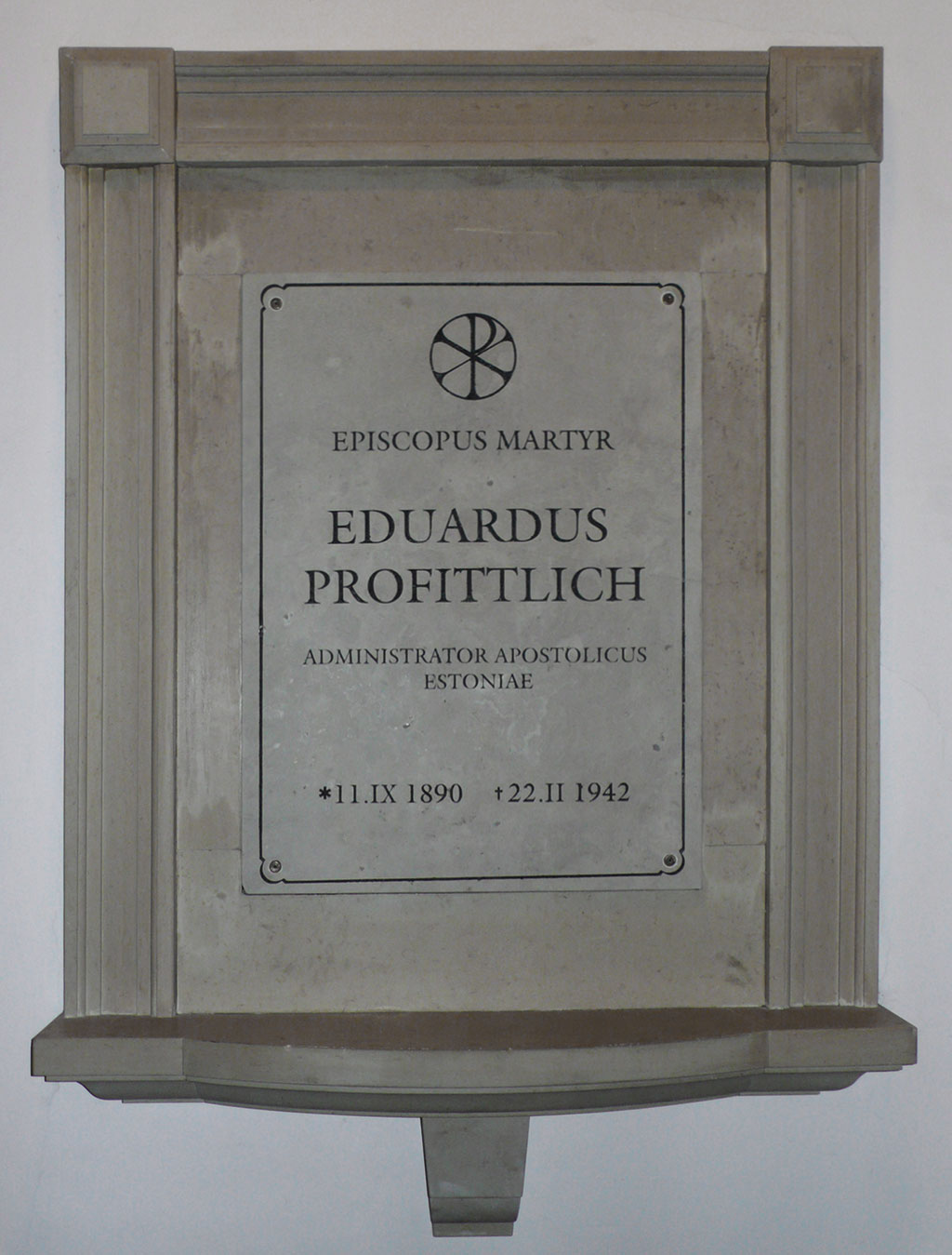 Eduard Profittlichi mälestustahvel Tallinna Peeter-Pauli kirikus (avatud 11.09.1990)